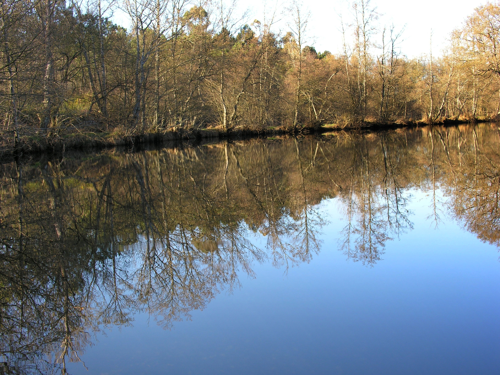 Río Furelos, parroquia de Furelos, concello de Melide, Galiza